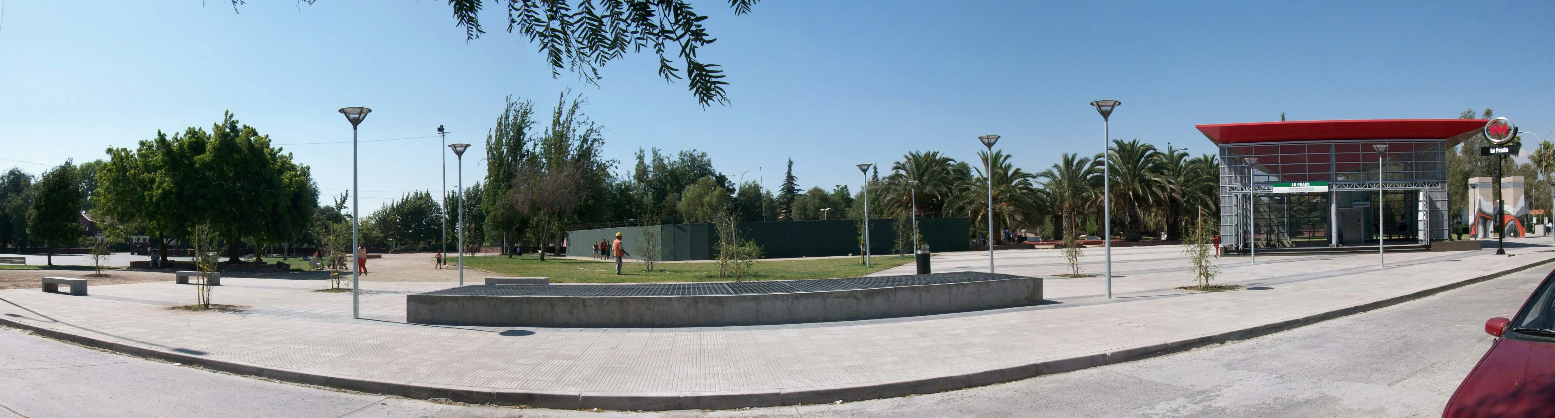 Rededores de la estación y la municipalidad